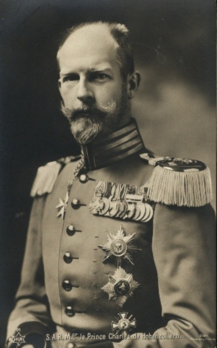 Prinz Karl Anton von Hohenzollern (1868-1919)